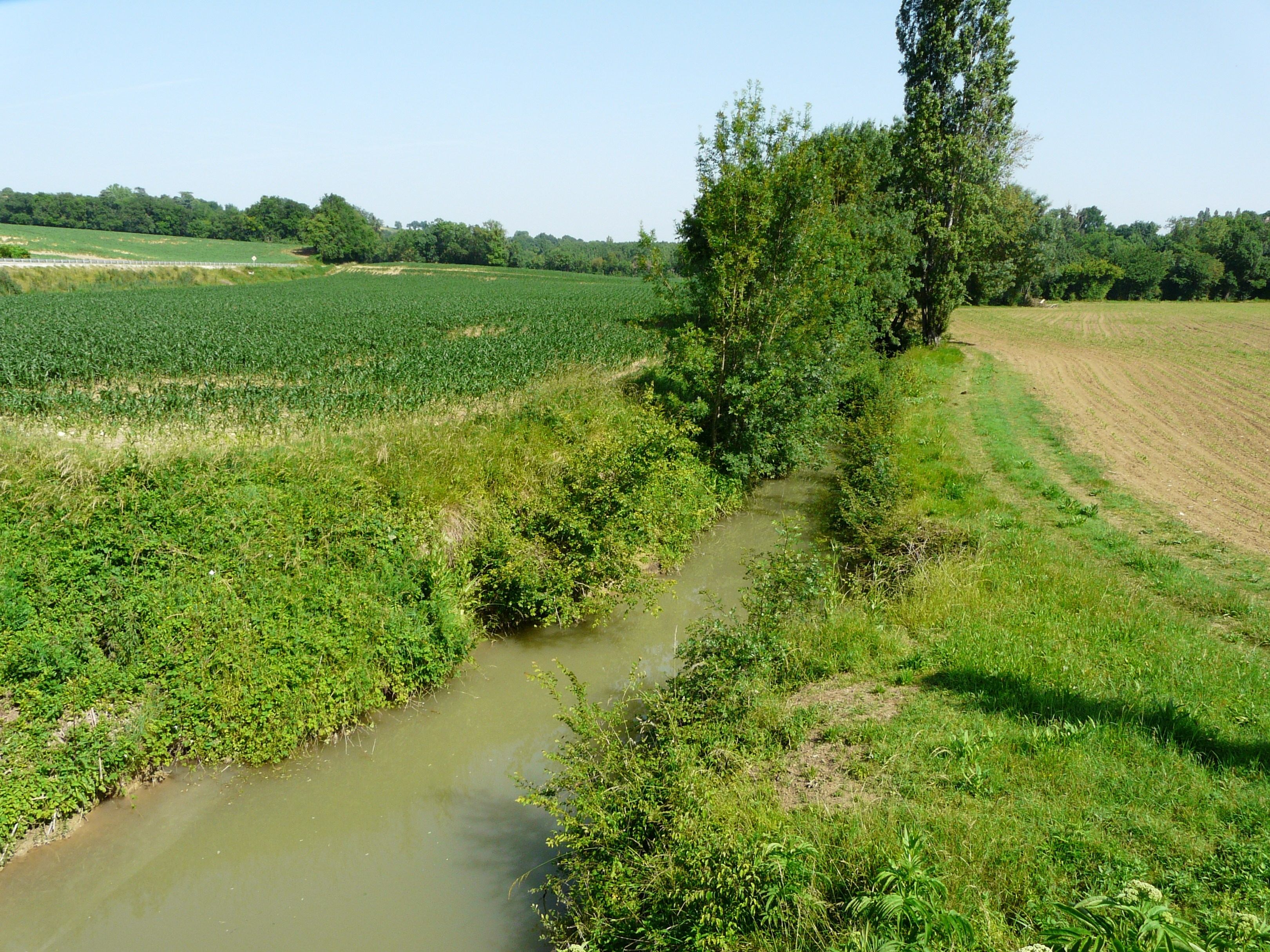 En amont de la route départementale 656, le Petit Auvignon marque la limite entre les communes de Montagnac-sur-Auvignon (à gauche) et Saumont (à droite) ; Lot-et-Garonne, France.